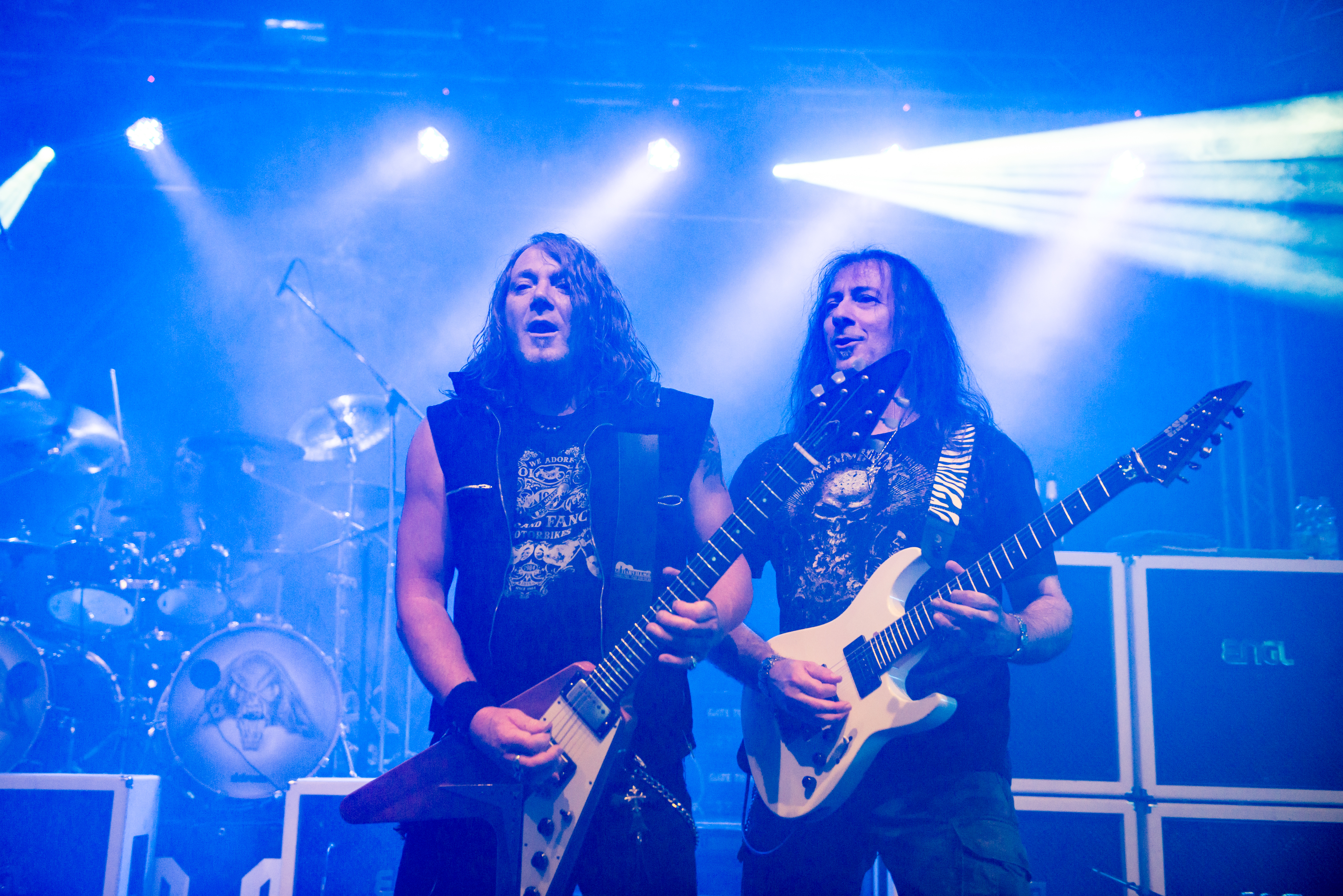 'Dong Open Air 2015; Neukirchen-Vluyn Halde Norddeutschland': 'Gamma Ray'